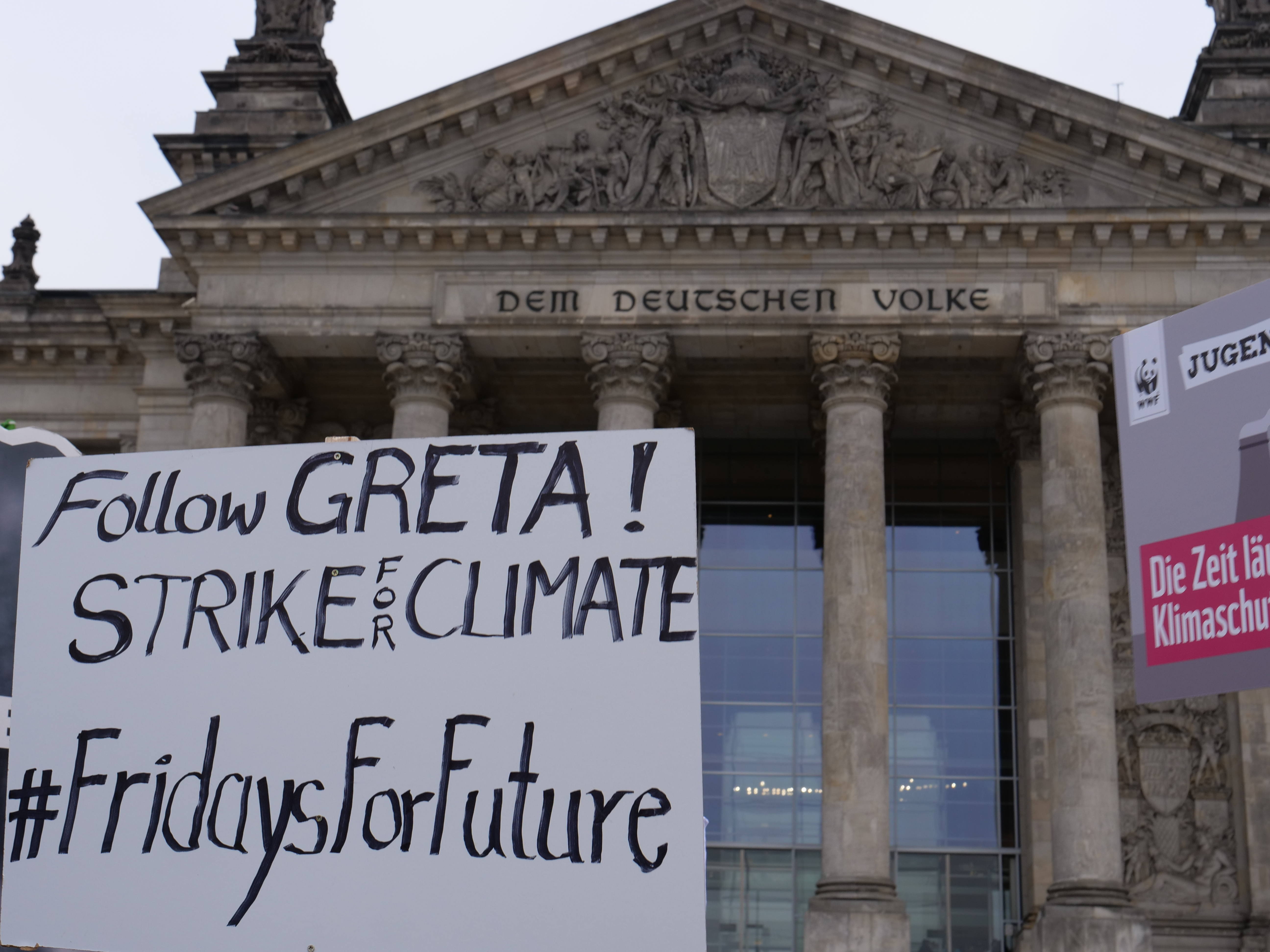 Unter dem Motto "#FridaysForFuture" und "Climate Strike!" streikten insbesondere Schülerinnen und Schüler vor dem Reichstagsgebäude in Berlin.